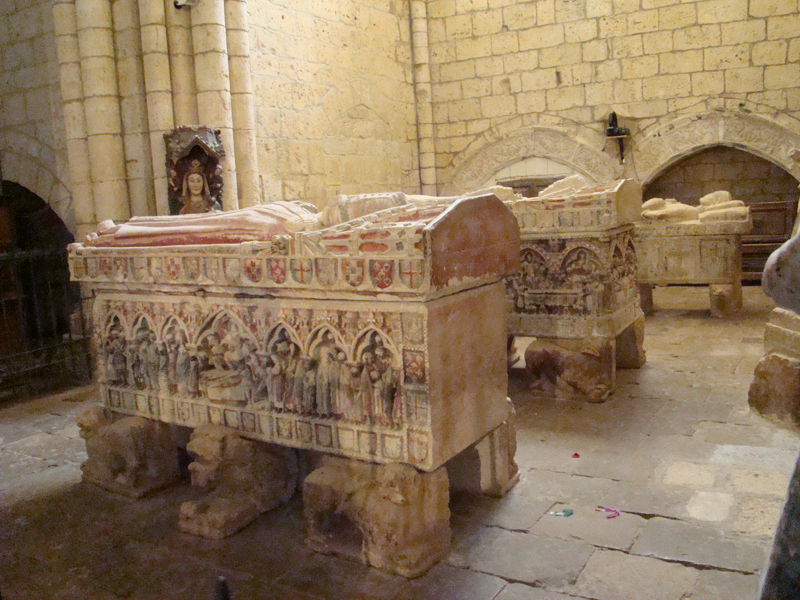 Villalcázar de Sirga en Palencia (España). Capilla de Santiago en la Iglesia de Santa María la Blanca. Tres enterramientos: Una dama que puede ser una de las esposas del infante; el infante Felipe de Castilla; el caballero de Santiago (caballero templario), Juan Pérez.